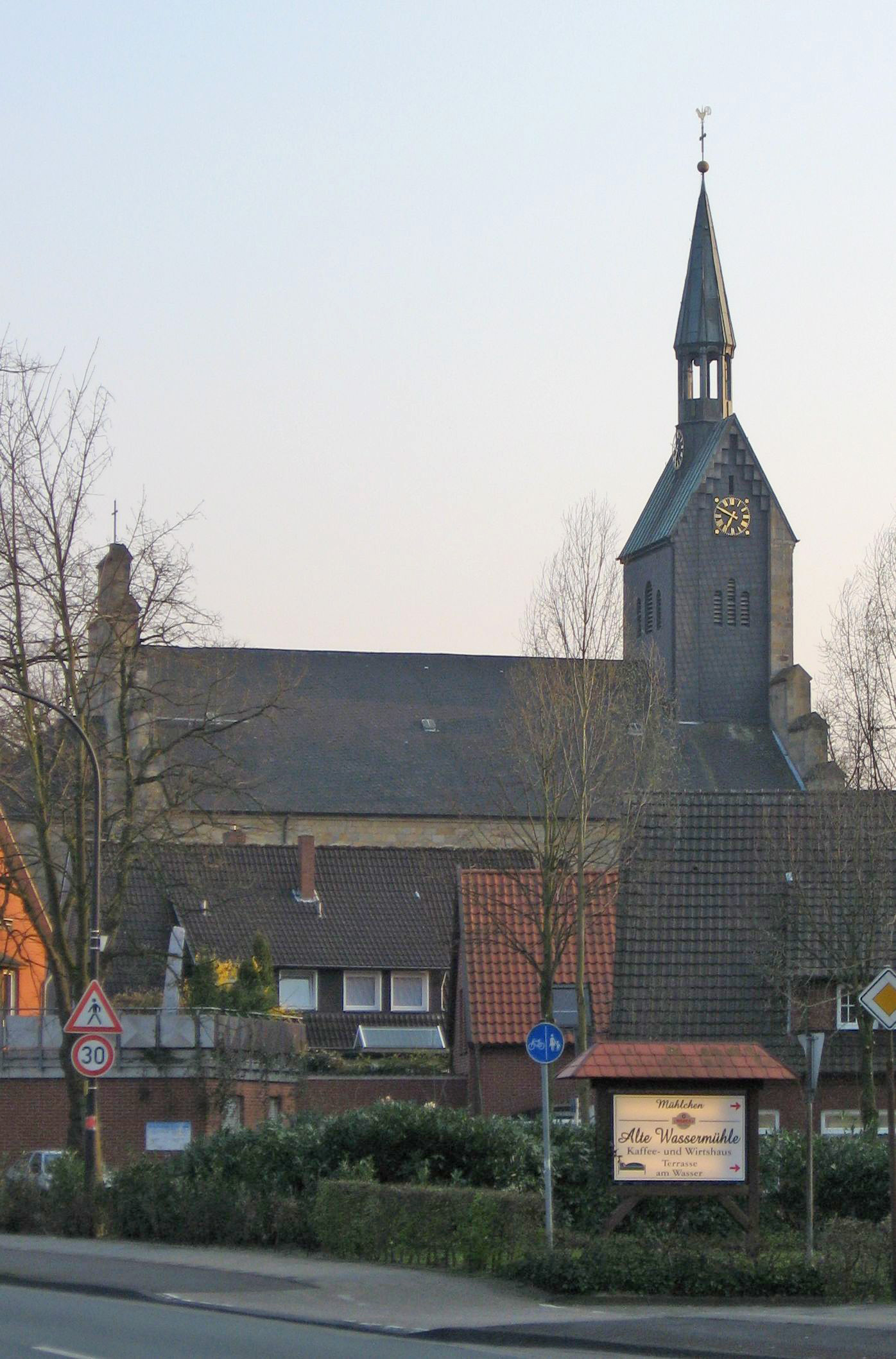 Ladbergen